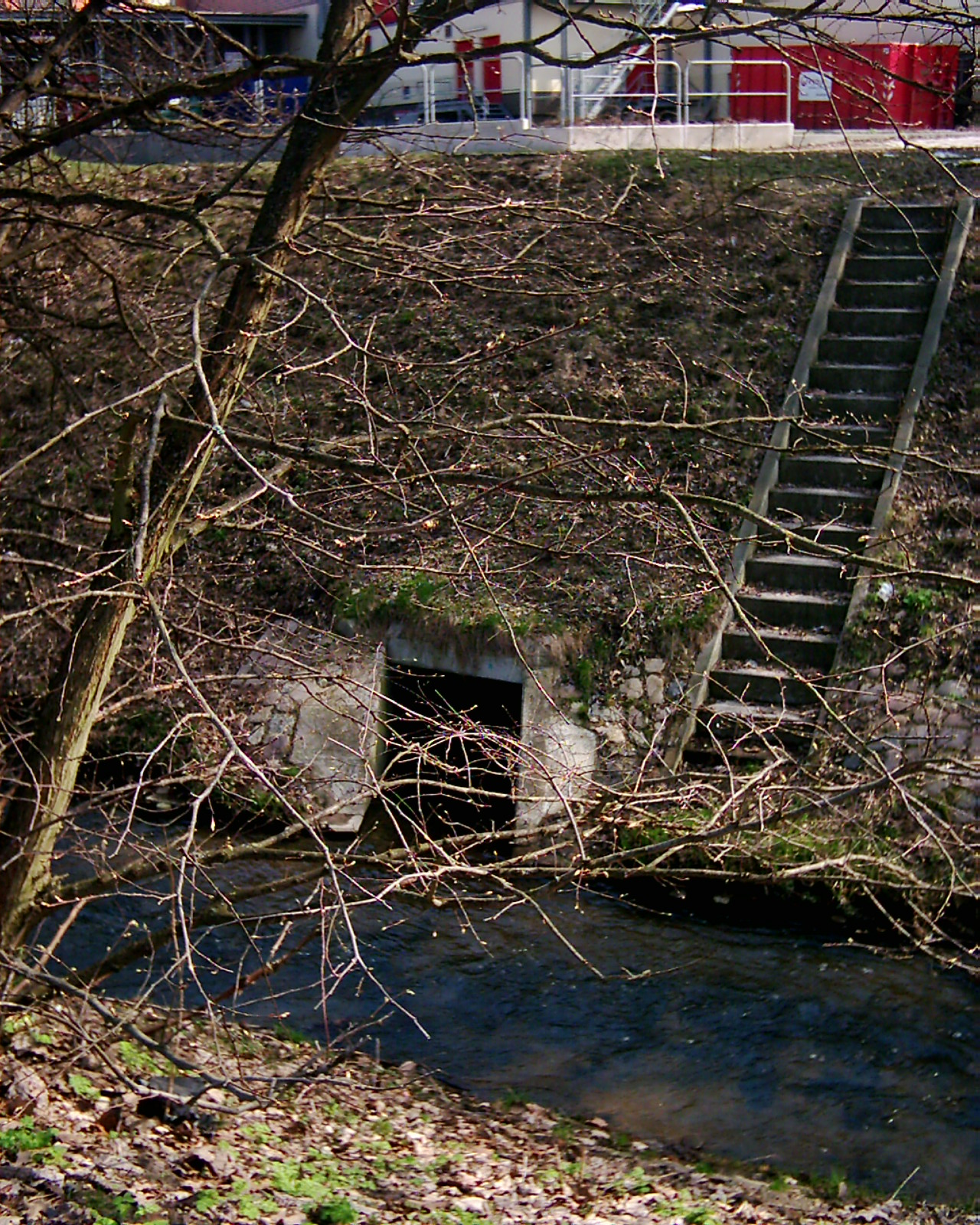 Neben dem Zufluss von Gräben und Bächen, erreichen auch viele Ableiter die Panke. Hier ist es ein Zufluss aus dem Einkaufszentrum Schlosspark-Passagen Buch.